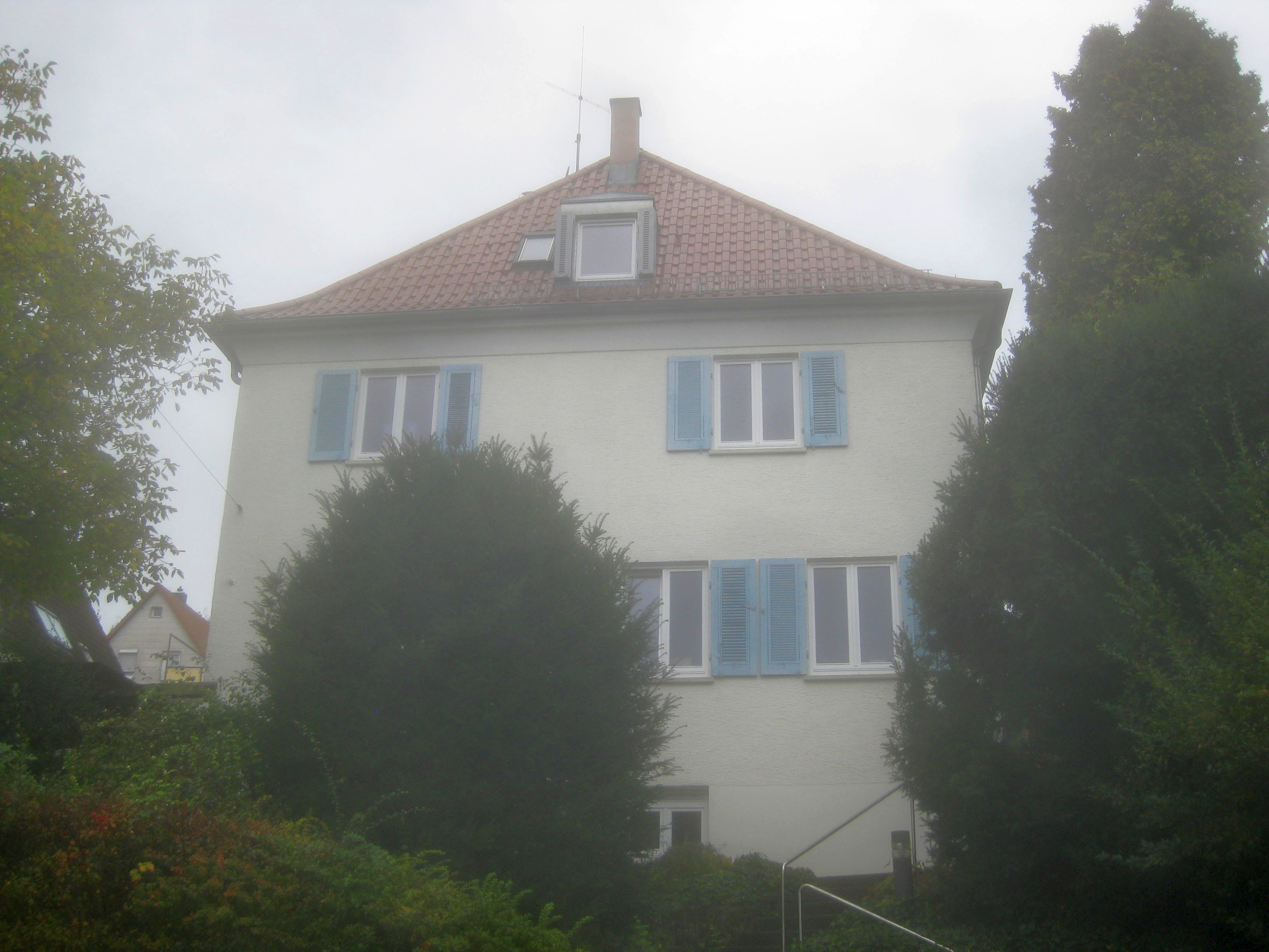 Haus Reginenstraße 38 in Stuttgart-Degerloch, in dem Josef Zeitler mit seiner Frau nach dem Zweiten Weltkrieg bis zu seinem Tod 1958 wohnte.